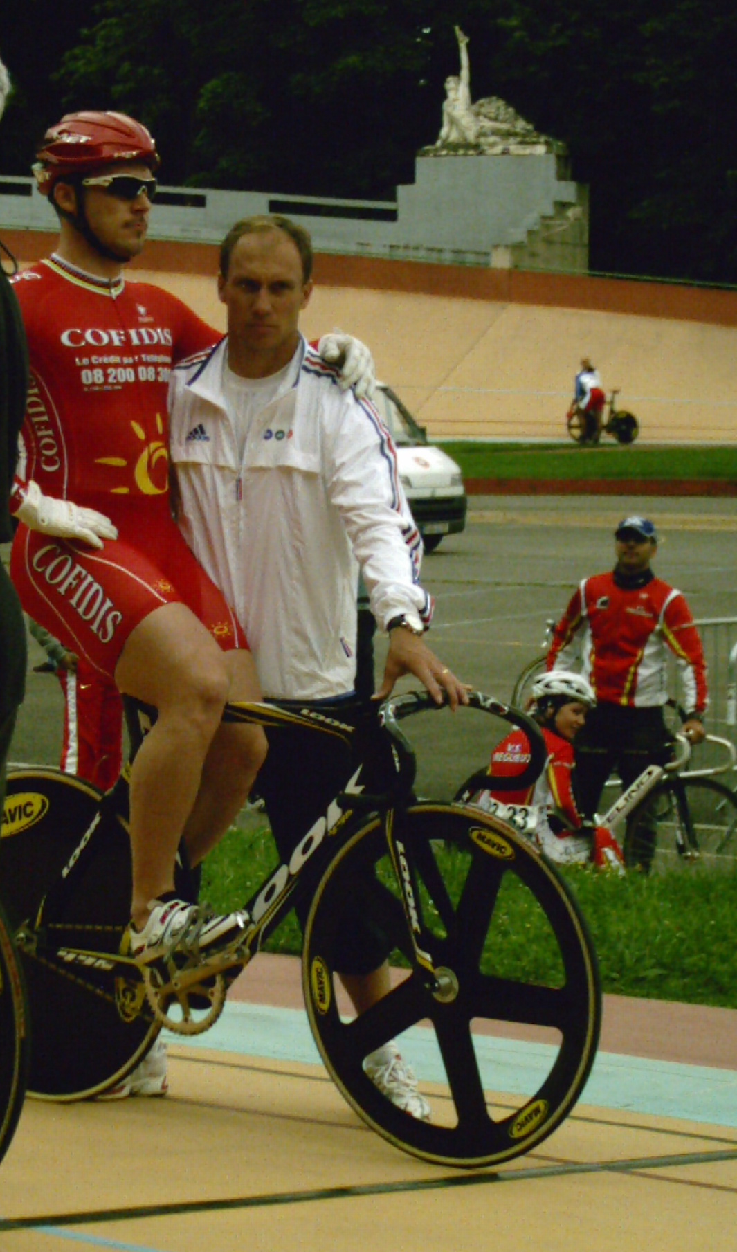 Arnaud Tournant au départ d'une manche de vitesse individuelle au vélodrome du Parc de la Tête d'Or à Lyon. Florian Rousseau, entraineur, l'accompagne au départ.